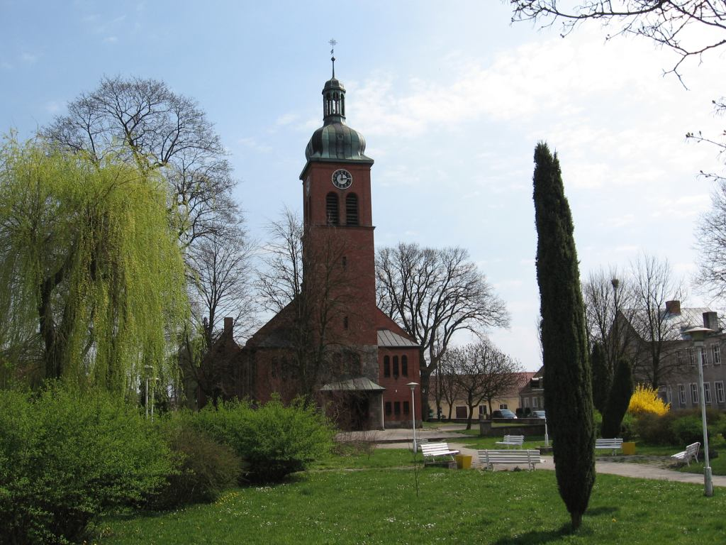 Zakrzewo - kościół parafialny p.w. Marii Magdaleny (zabytek nr 634/Wlkp/A)